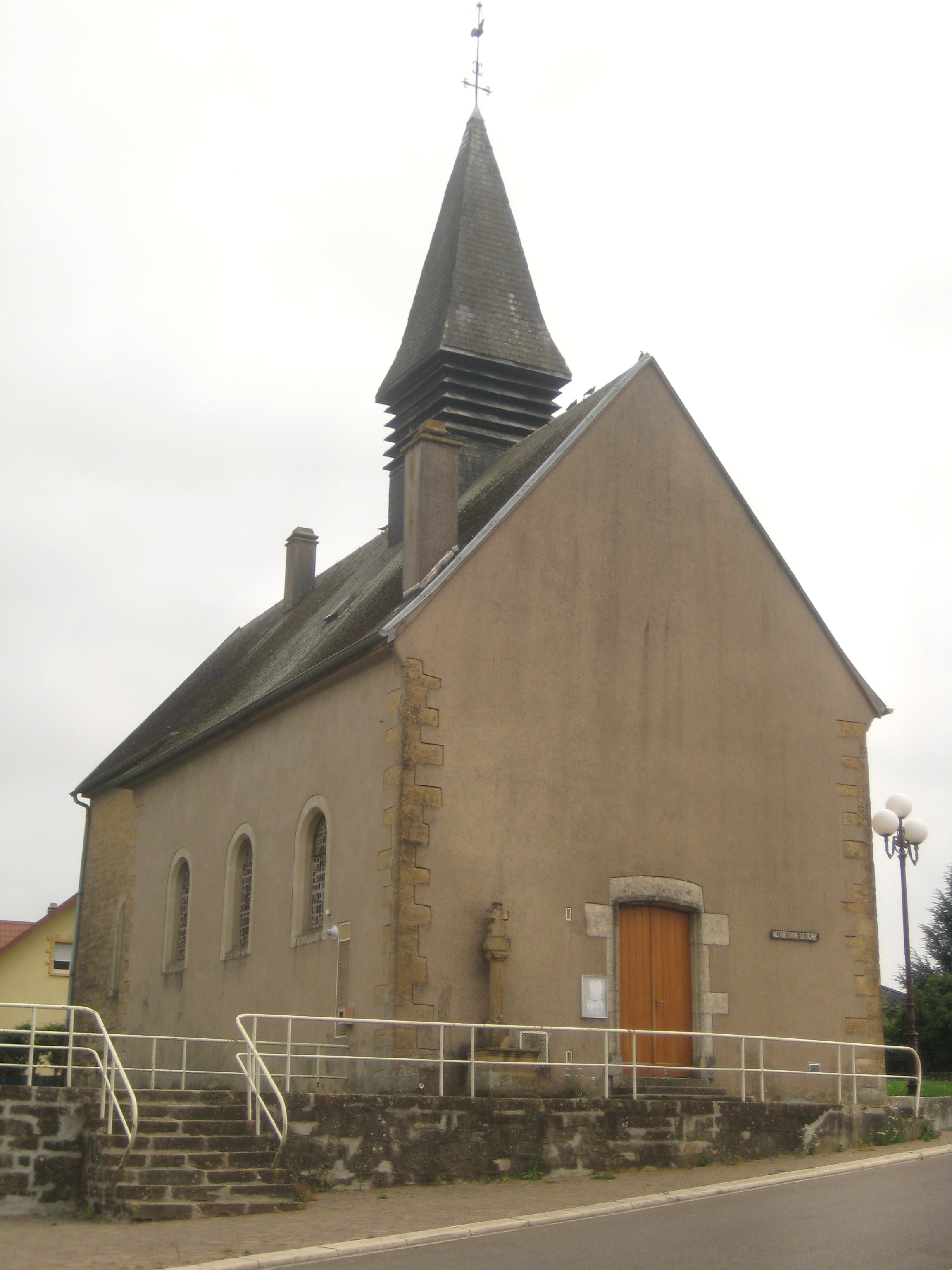 Description chapelle de Bure Date3 August 2011SourceAimelaimeAuthormoi-même chapelle de Bure